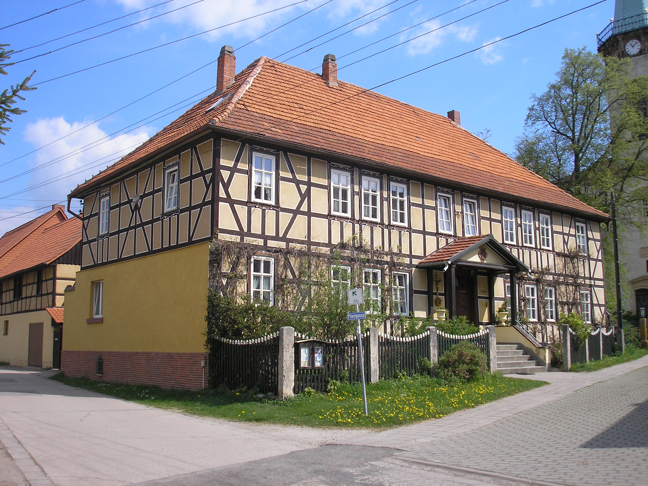 Das Pfarrhaus von Werningshausen (Thüringen).